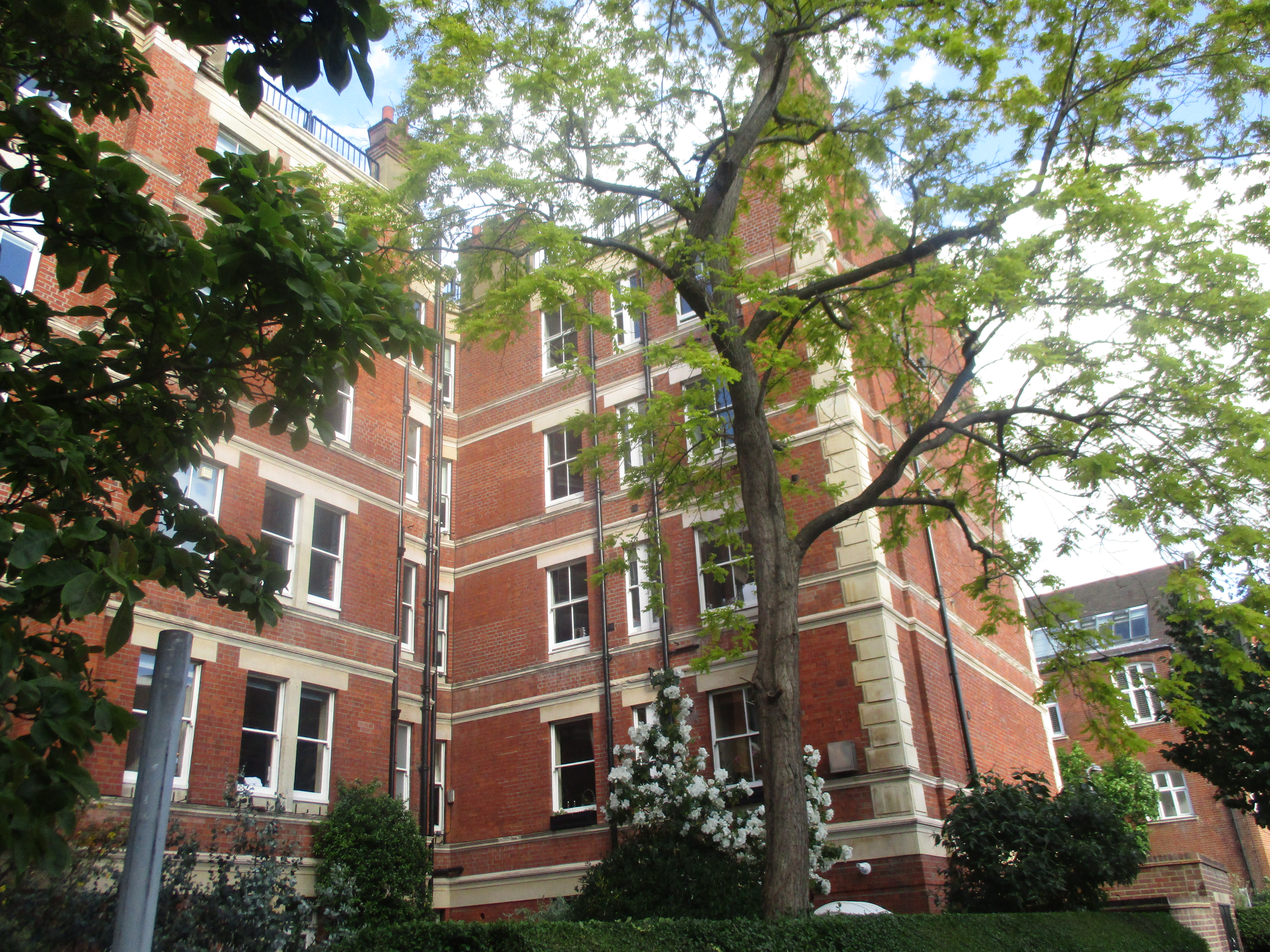 Vue de côté de York Mansions à Londres (Forfar Road).